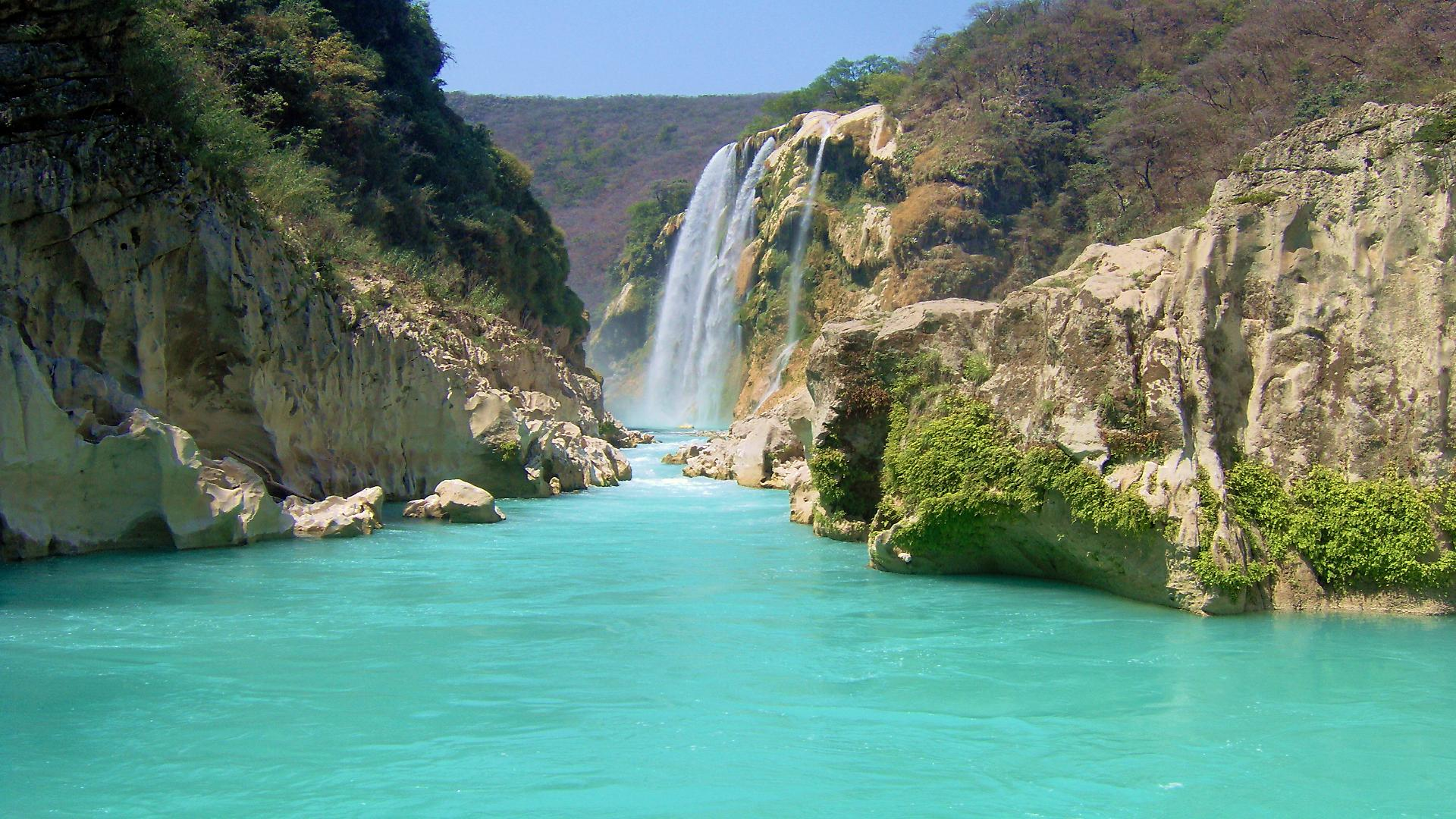 Cascada vista desde abajo